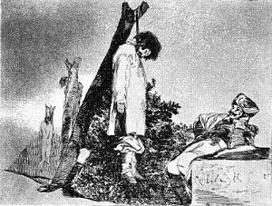 Goya